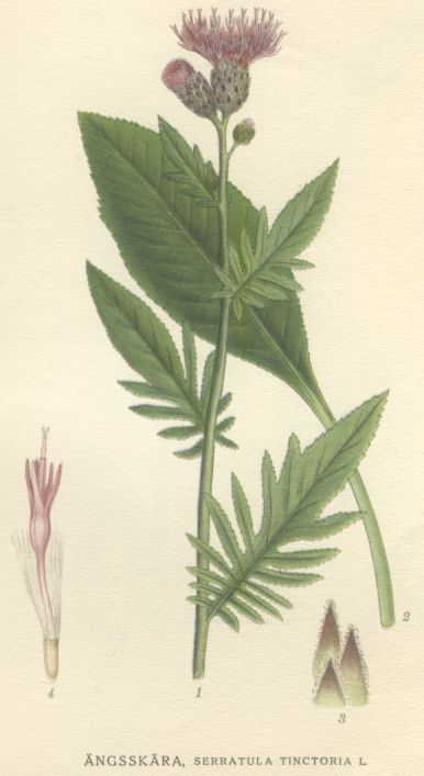 Serratula tinctoria